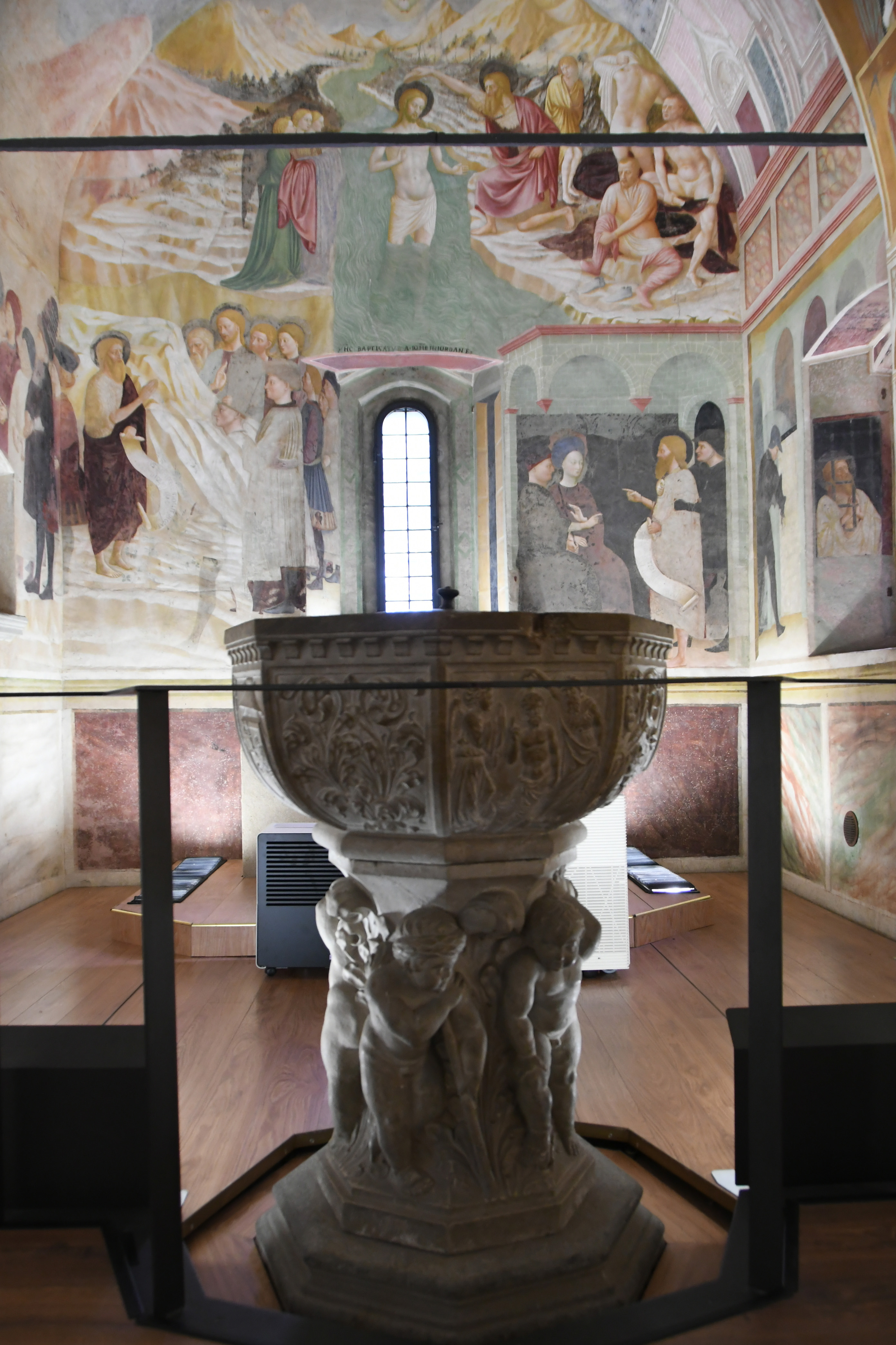 Fonte Battesimale eseguito da Francesco Solari con stemma della famiglia del Cardinale Branda Castiglioni per il Battistero della Collegiata di Castiglione Olona in provincia di Varese